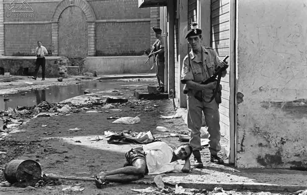 مواطن مصاب جراء تبادل اطلاق النار كريتر4ابريل1967